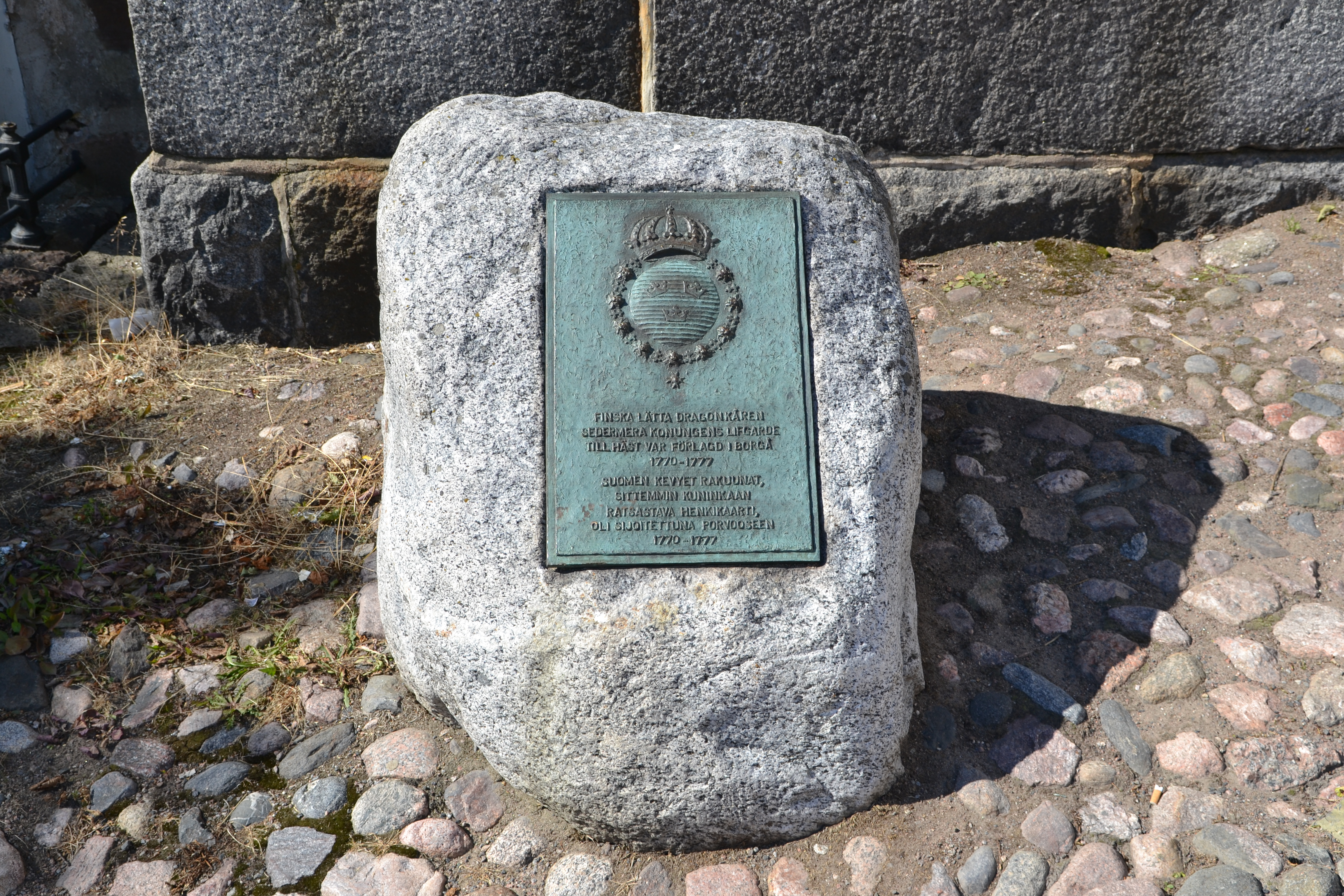 Livgardet till häst minnessten i Borgå, Finland.